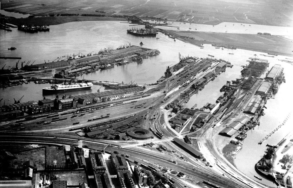 Amsterdam Havens Oost voor WO2